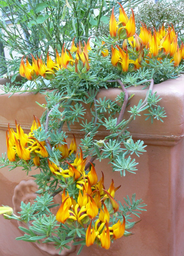 Lotus maculatus